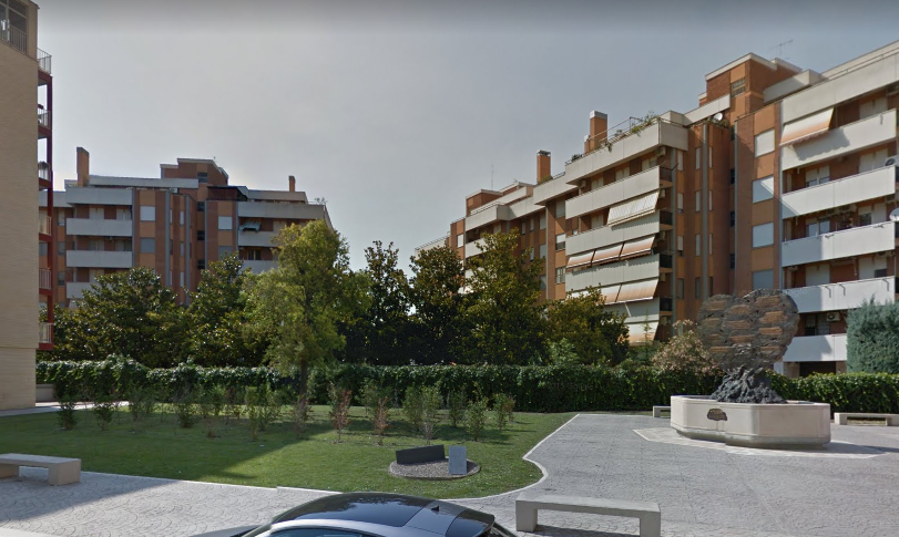 il giardino e il monumento costruiti nel 2011 in memoria delle 67 vittime